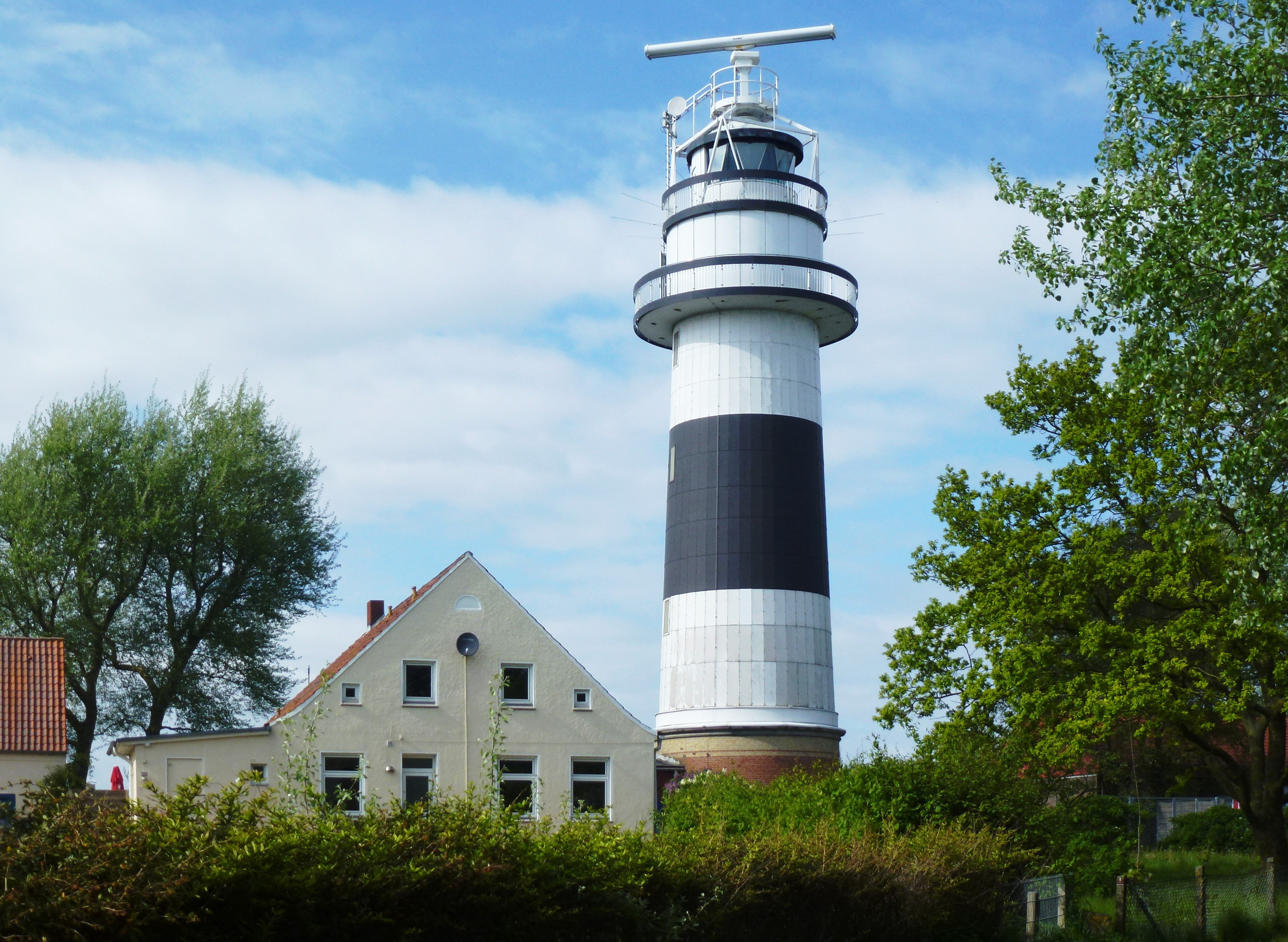 Leuchtturm Bülk